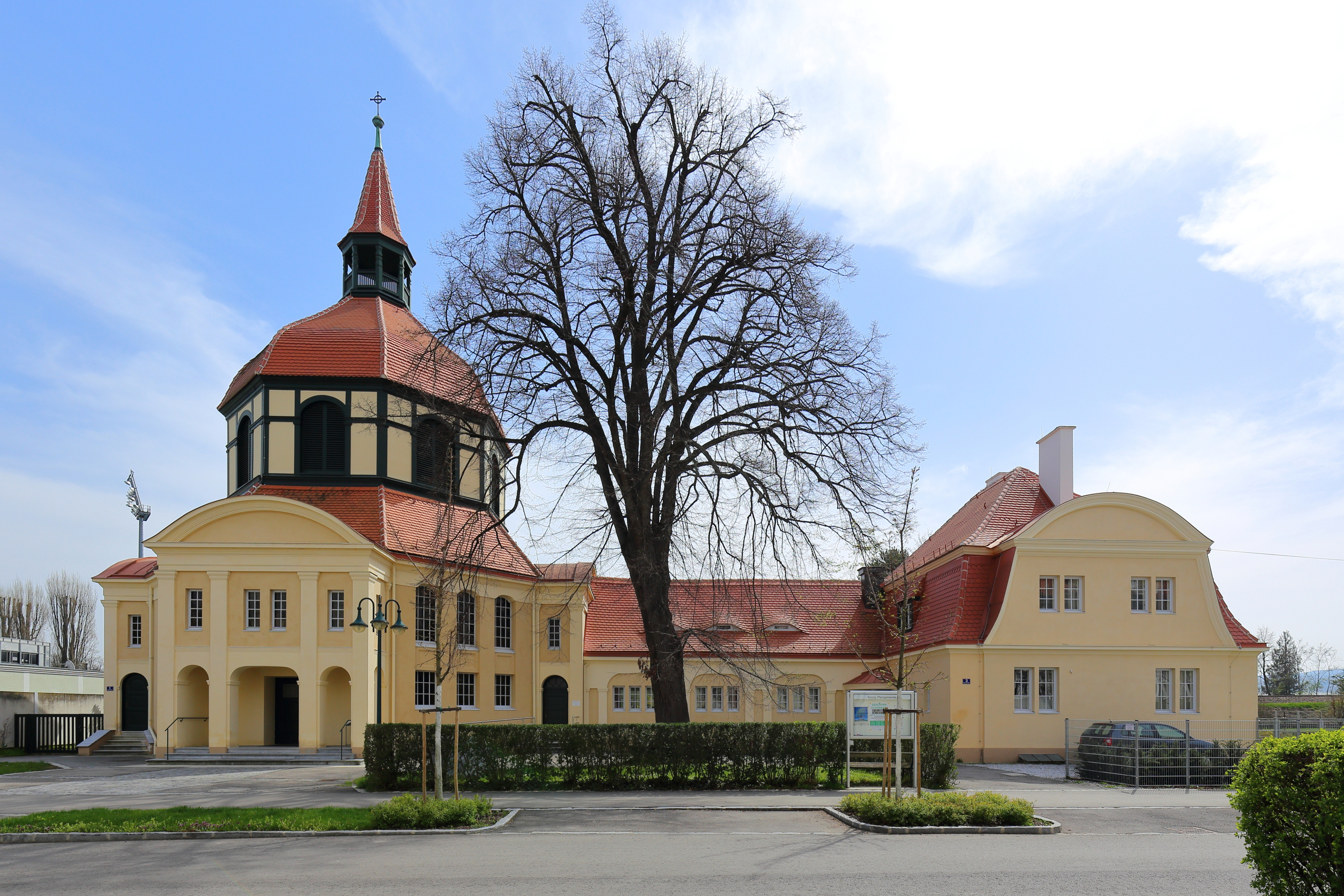 Nordansicht der Heilandskirche in der niederösterreichischen Stadt Krems an der Donau.Der oktogonale Kuppelbau wurde nach den Plänen des Architekten Otto Bartning errichtet und 1913 geweiht. Westseitig schließt der Gemeindsaal und das Pfarrhaus an.